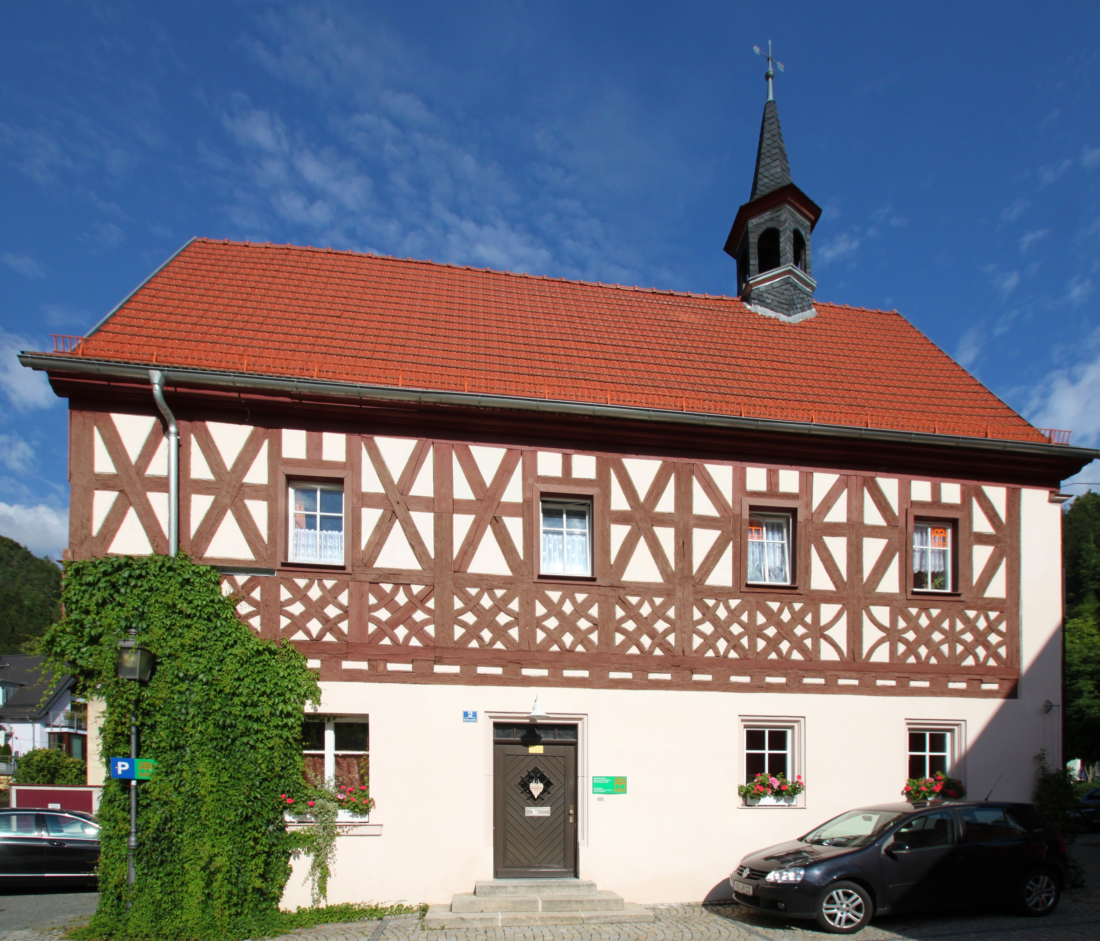 Ehemaliges Rathaus, Rathausplatz 2 Wirsberg, Baudenkmal D-4-77-163-18